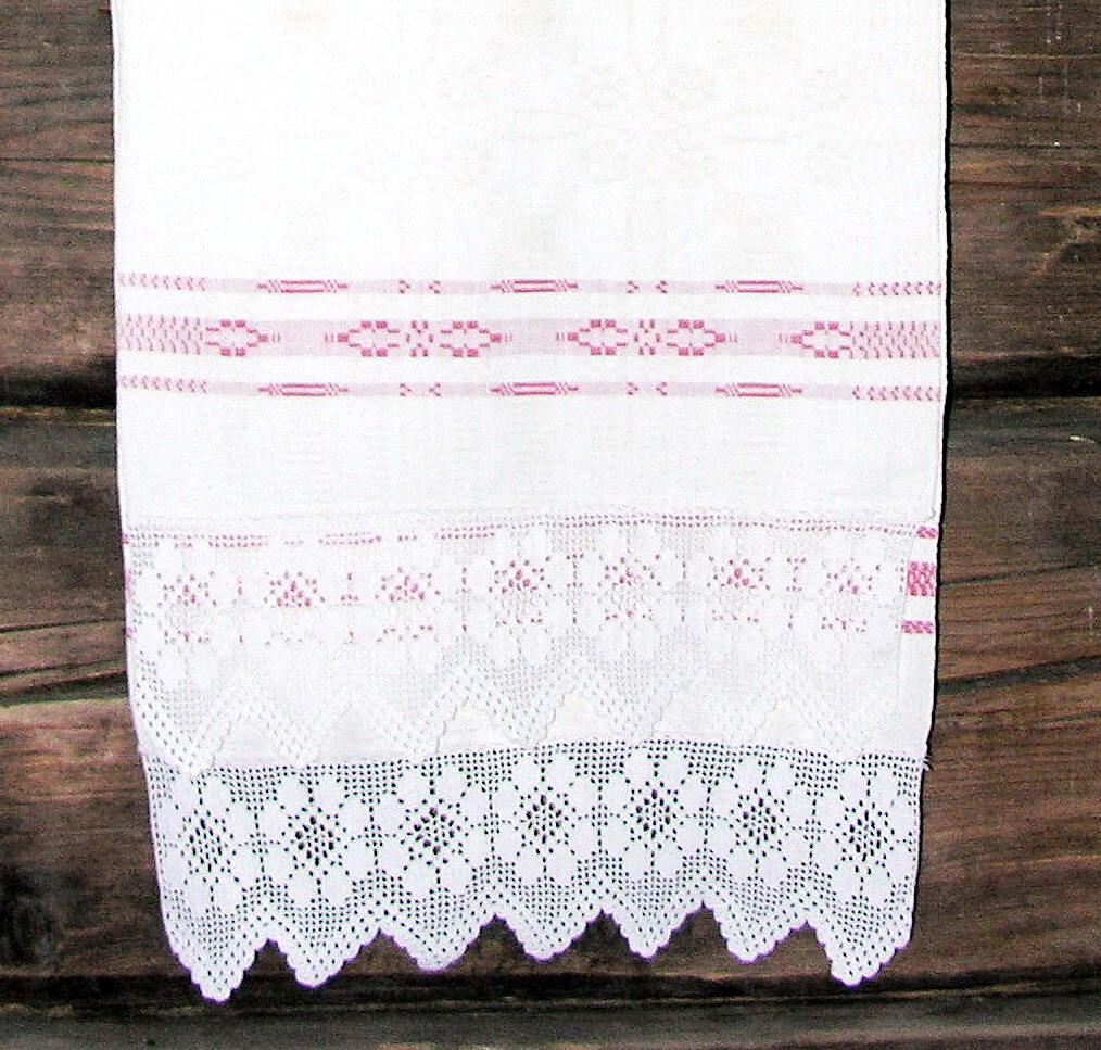 Žemaitėška: Žičkā, 2007 m. balondė 21 d., Žemaitėjė